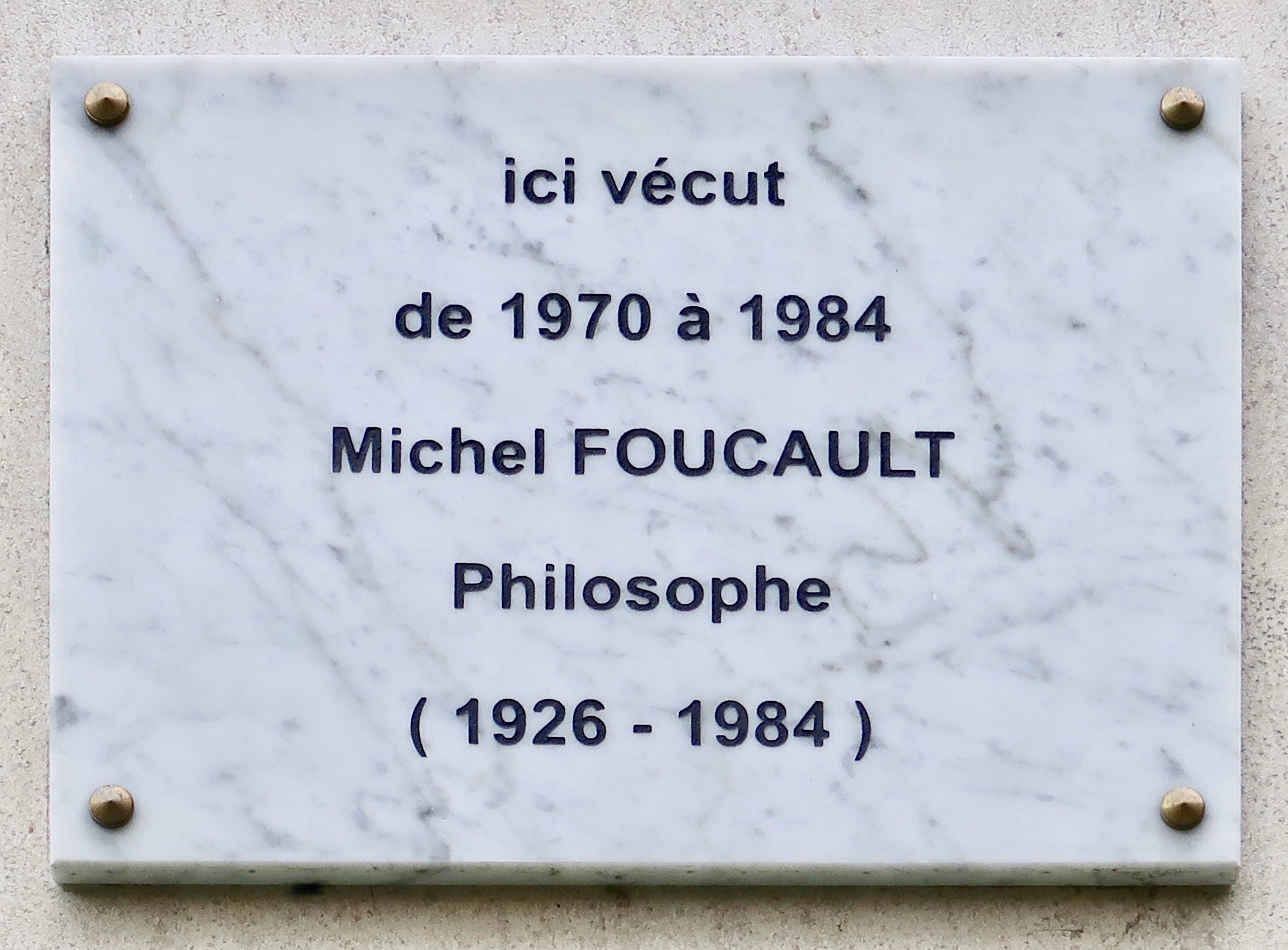 Plaque en hommage à Michel Foucault, 289 rue de Vaugirard (Paris, 15e).